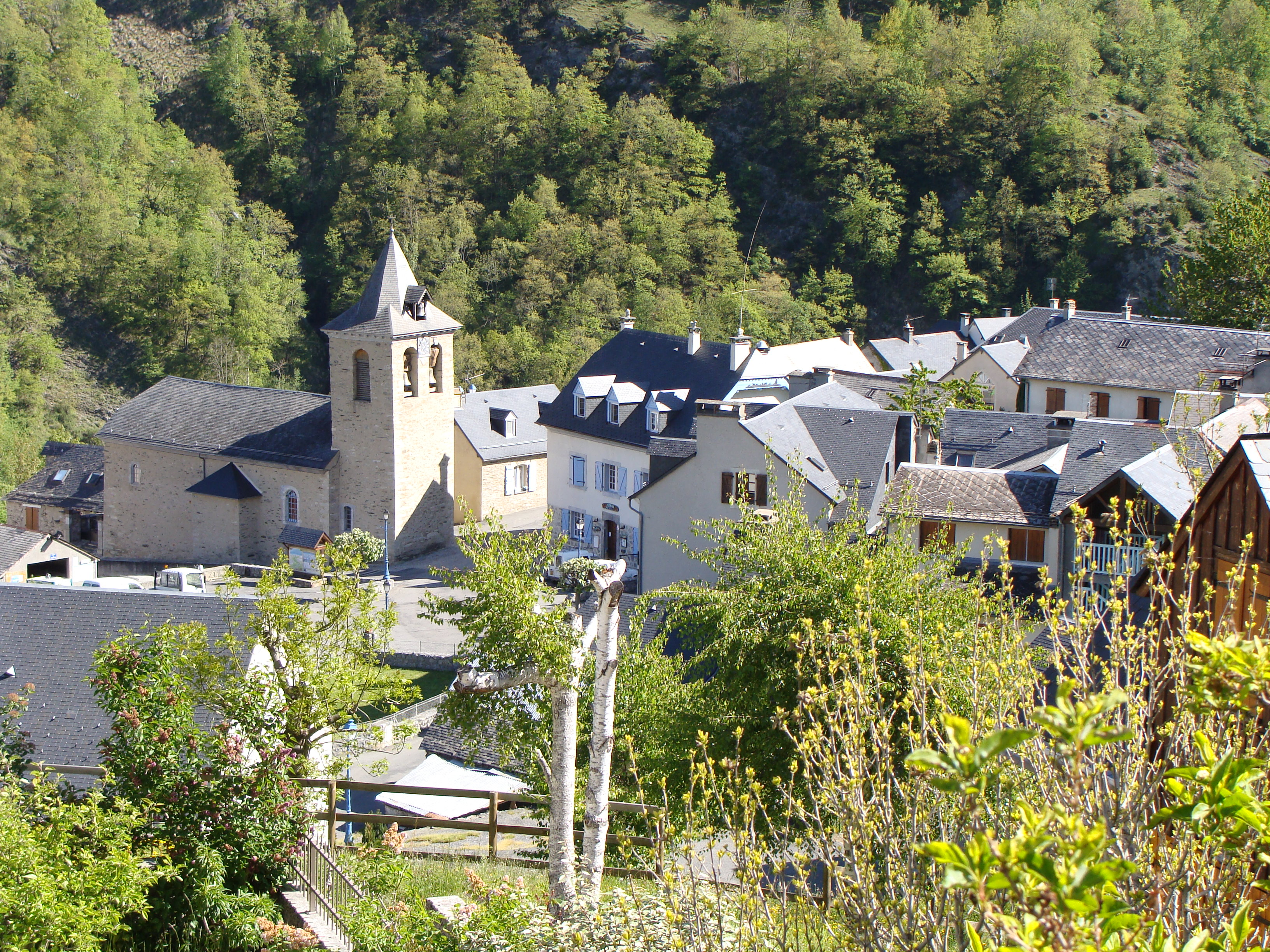 Viella (Hautes-Pyrénées) Église